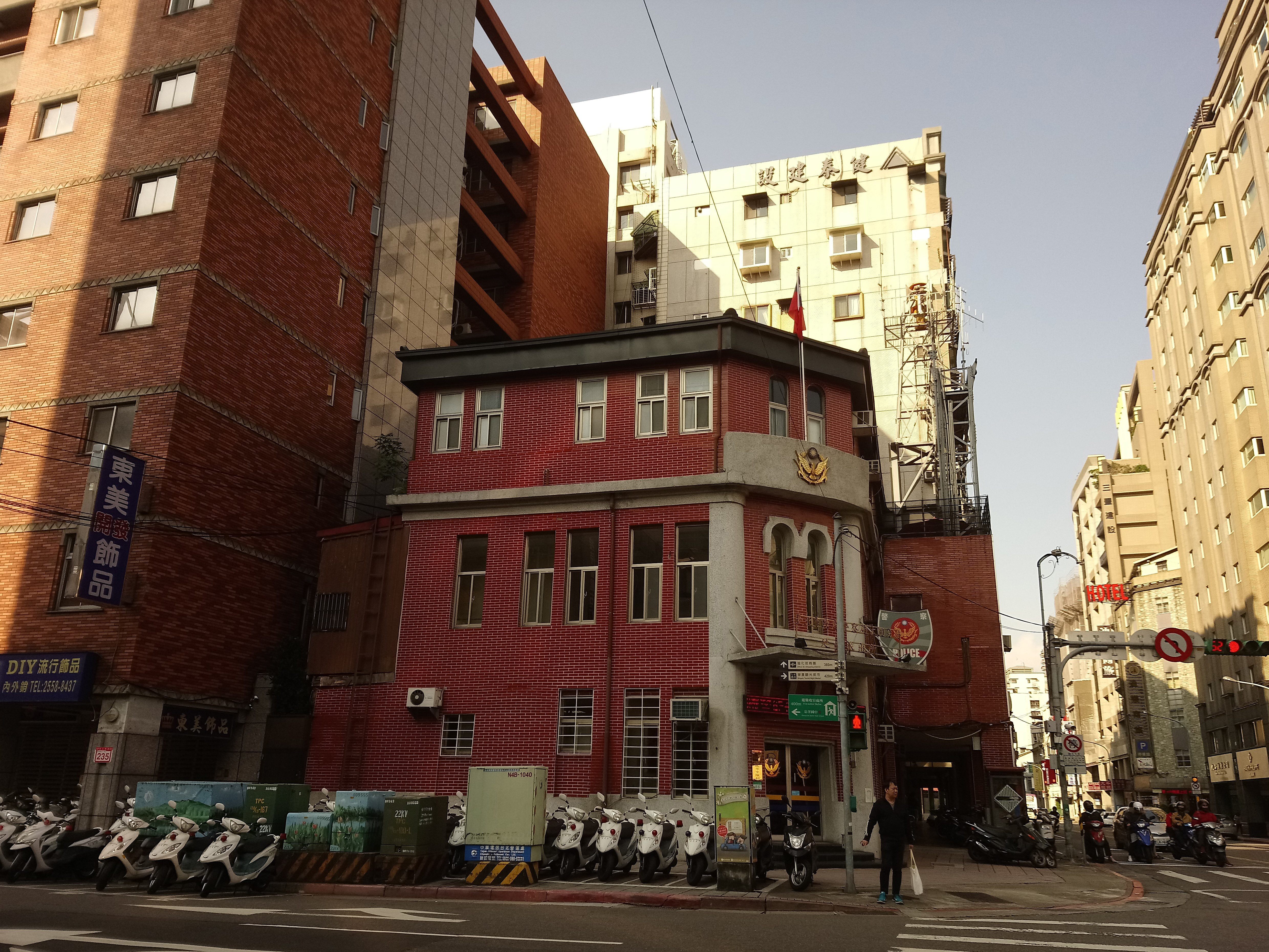 太平町二丁目警察官吏派出所(今臺北市政府警察局大同分局延平派出所),臺北市大同區延平次分區永樂里